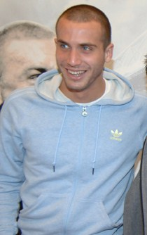 De Silvestri Negozio In Centro